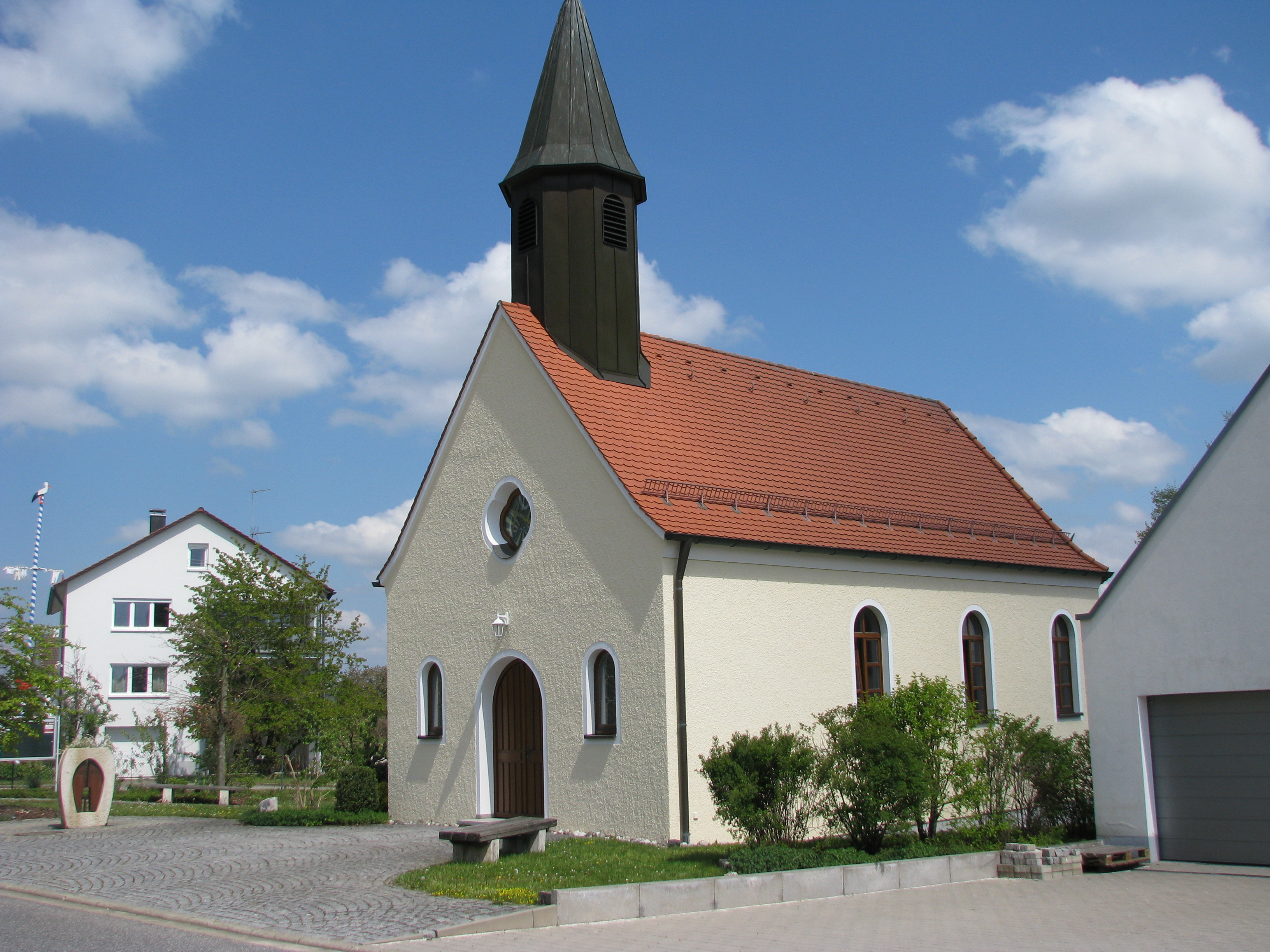 Buchberg, Ortsteil der Gemeinde Sengenthal im Landkreis Neumarkt in der Oberpfalz, Ortskapelle